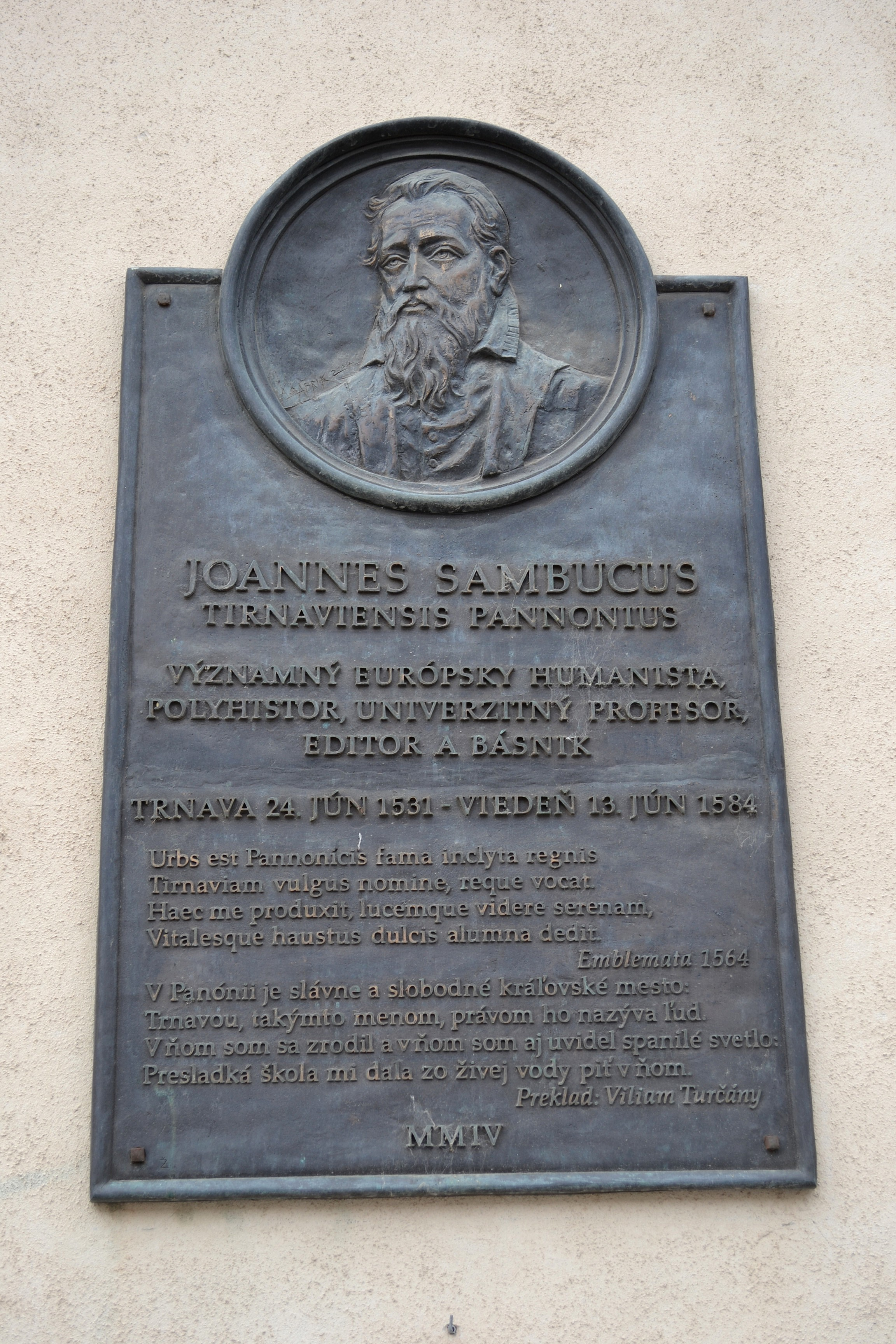 Trnava, budova mestskej radnice; pamätná tabuľa humanistovi a polyhistorovi Joannovi Sambucovi